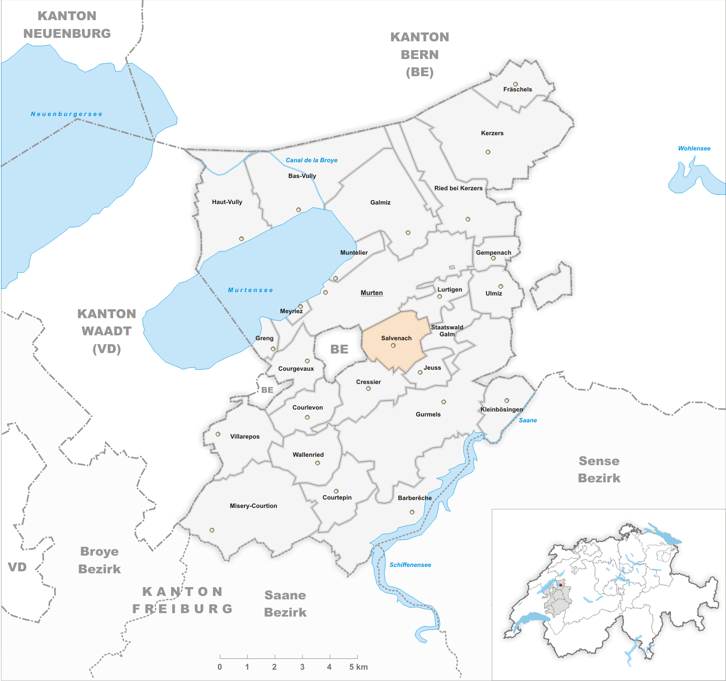 Municipality Salvenach